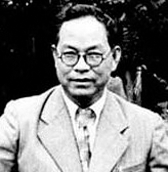 박헌영, 1946년경